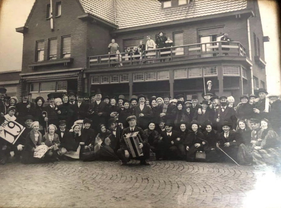 Limburgs: Boerebroelof 1937 in Tegele beej Cafe de Magere.